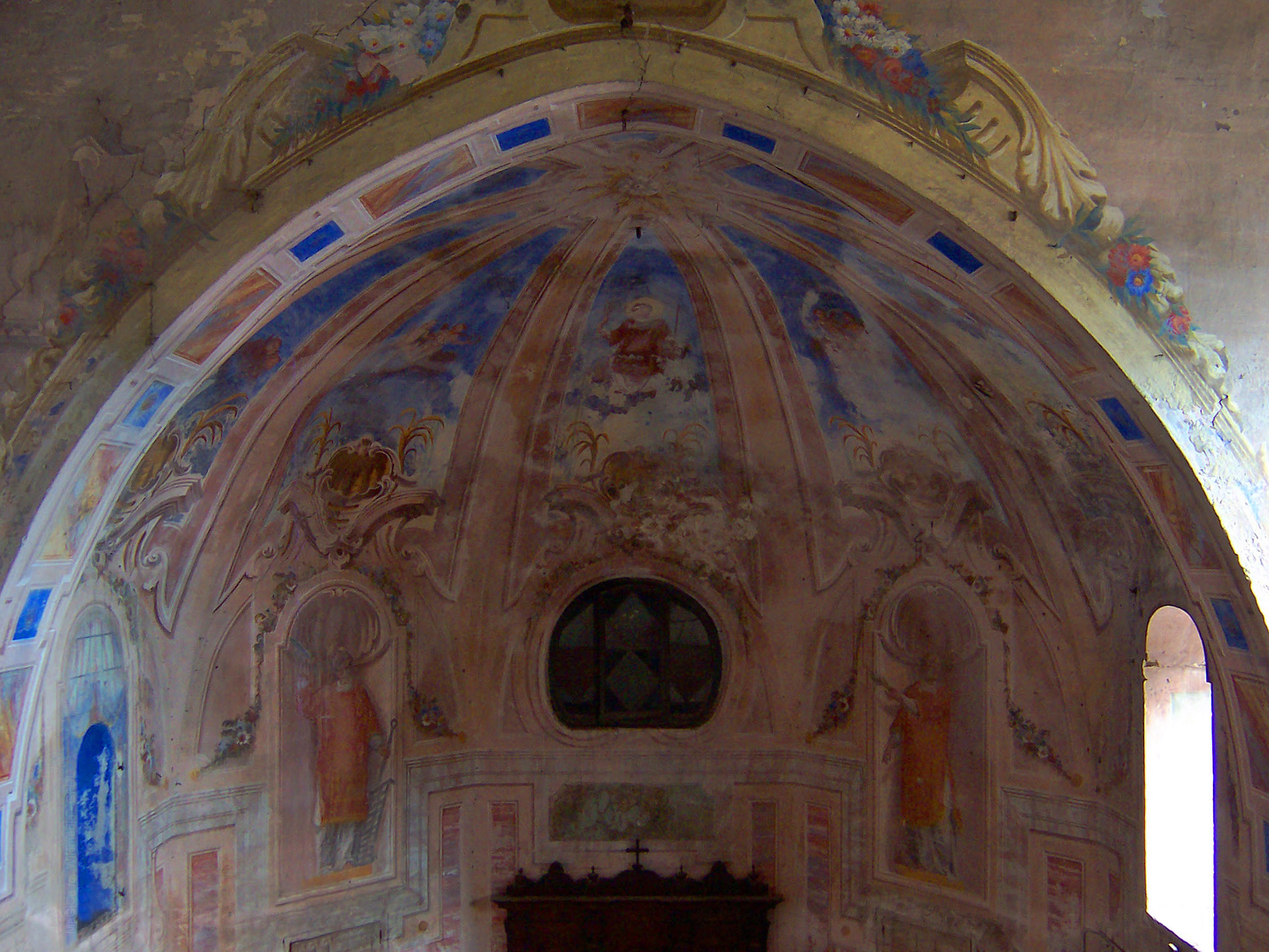 Abside della vecchia chiesa parrocchaie, ora parte della sacrestia dell'attuale chiesa parrocchiale